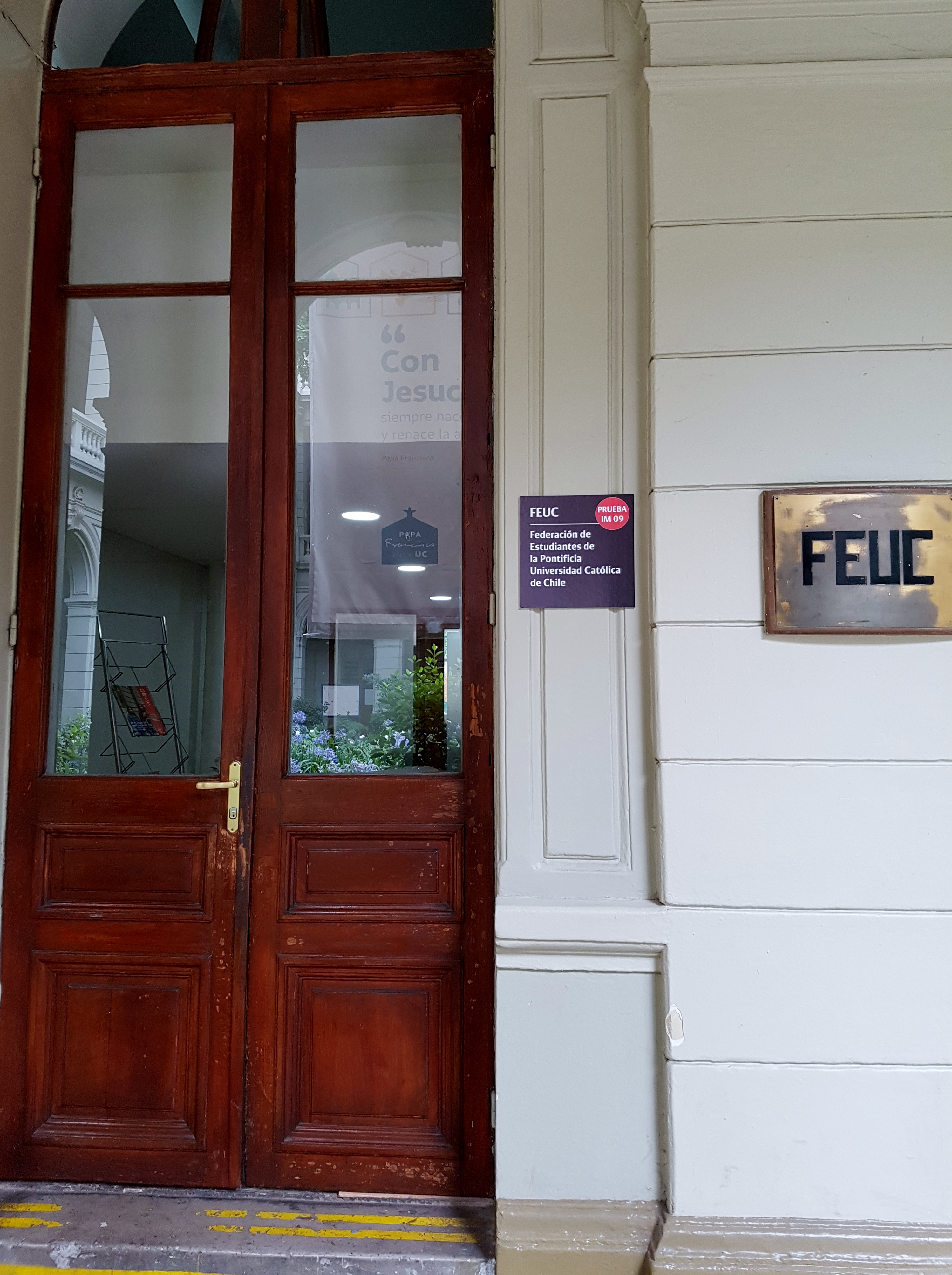 Oficinas de la Federación de Estudiantes de la Universidad Católica; costado sur del patio de la Virgen en el campus Casa Central de la Universidad Católica, Santiago de Chile.